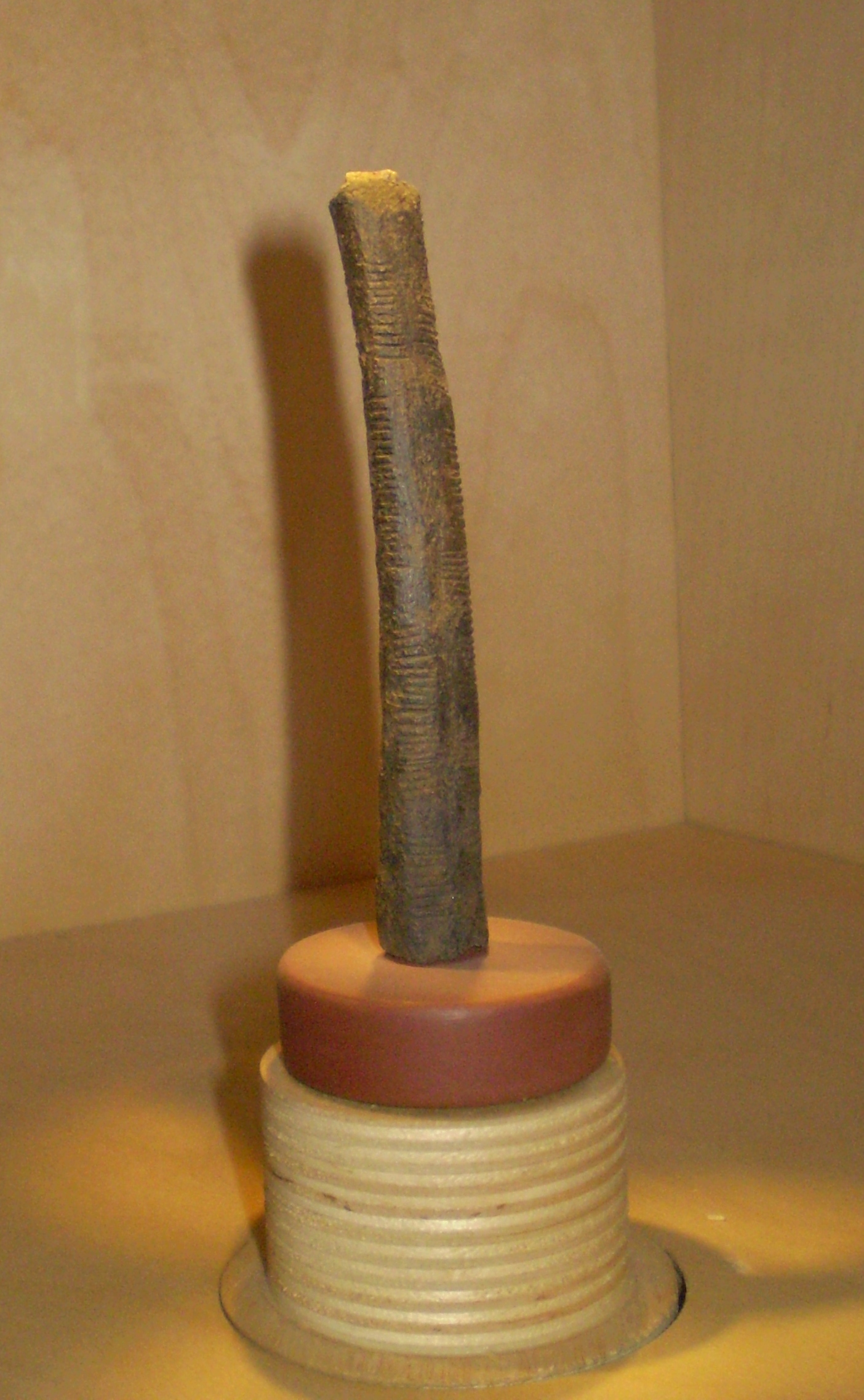 Os d'Ishango, Institut Royal des Sciences naturelles de Belgique, Bruxelles